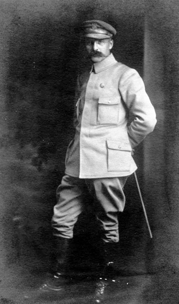 Józef Piłsudski w Wiedniu